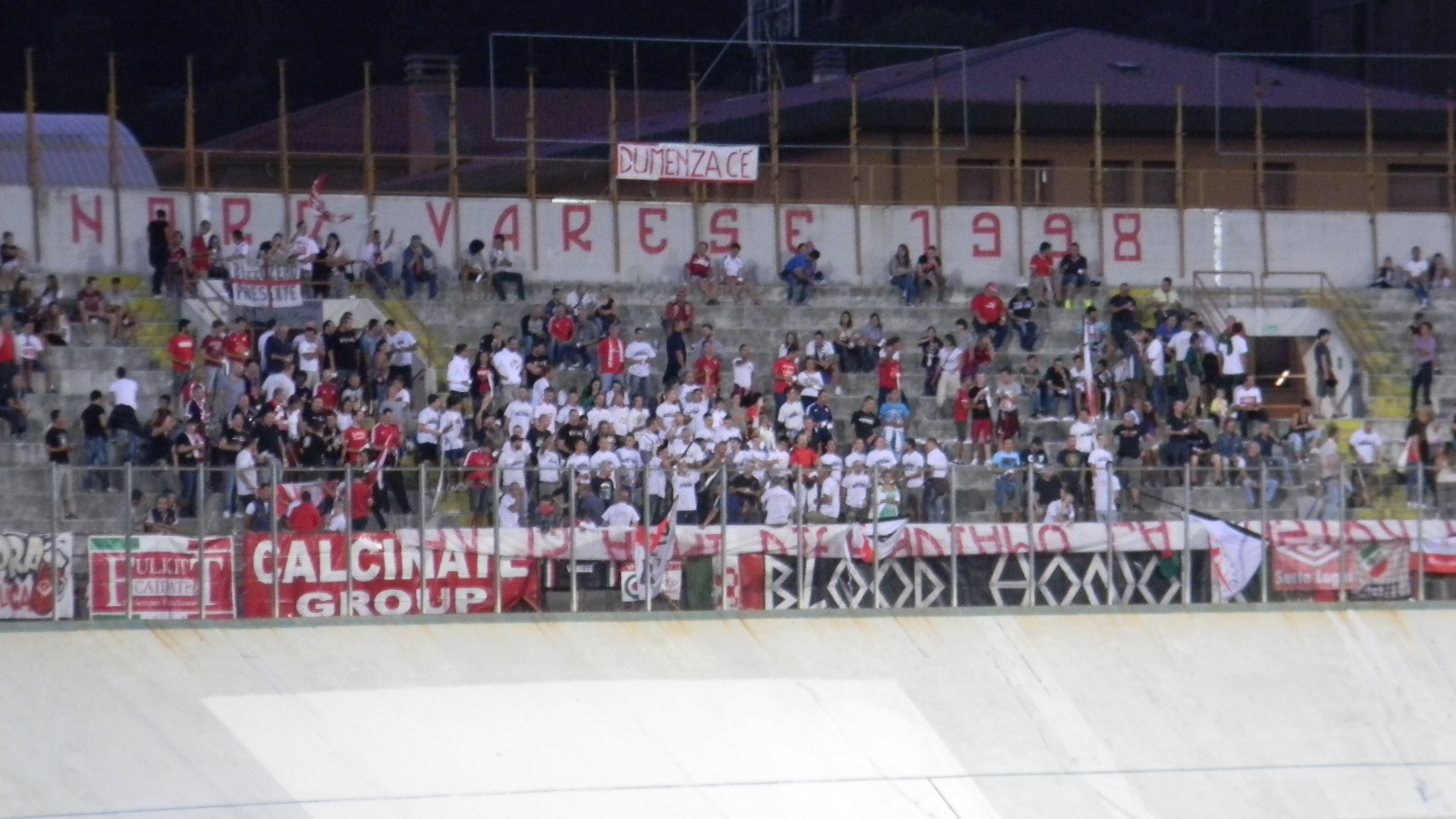 Tifosi dell'A.S. Varese 1910 nella Curva Nord dello Stadio Franco Ossola.